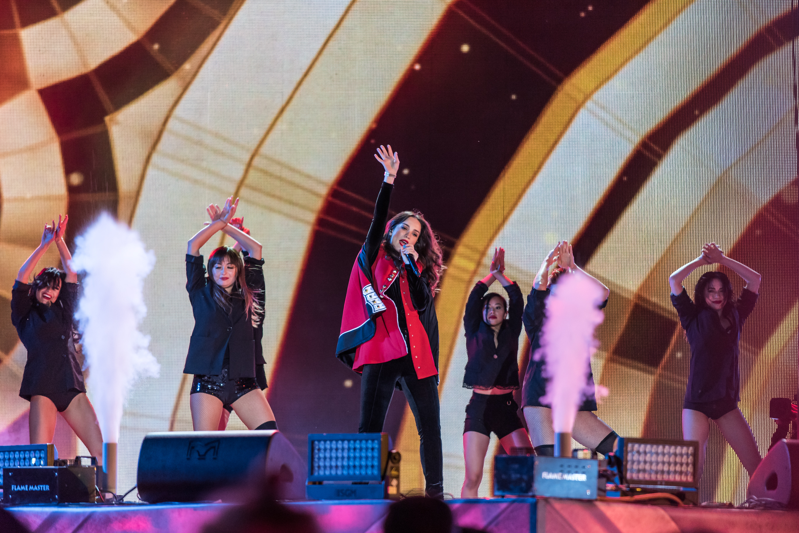 Виктория Дайнеко на Алых парусах 2018